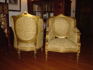 Une paire de bergères de type Louis XVI à médaillon, en bois sculpté et doré.